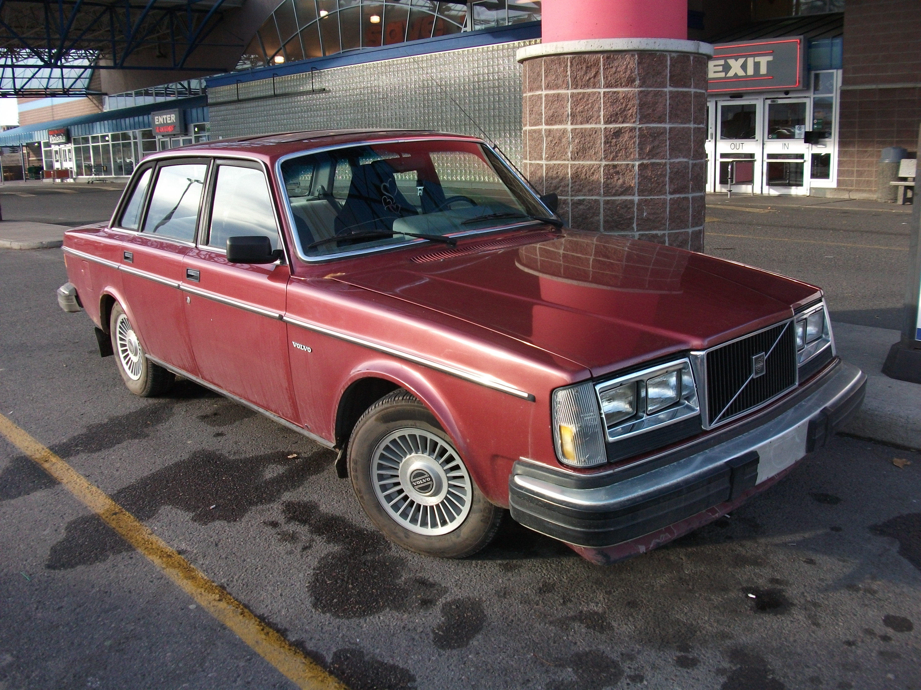 Volvo 240 series sedan - 1981 Volvo 244GL